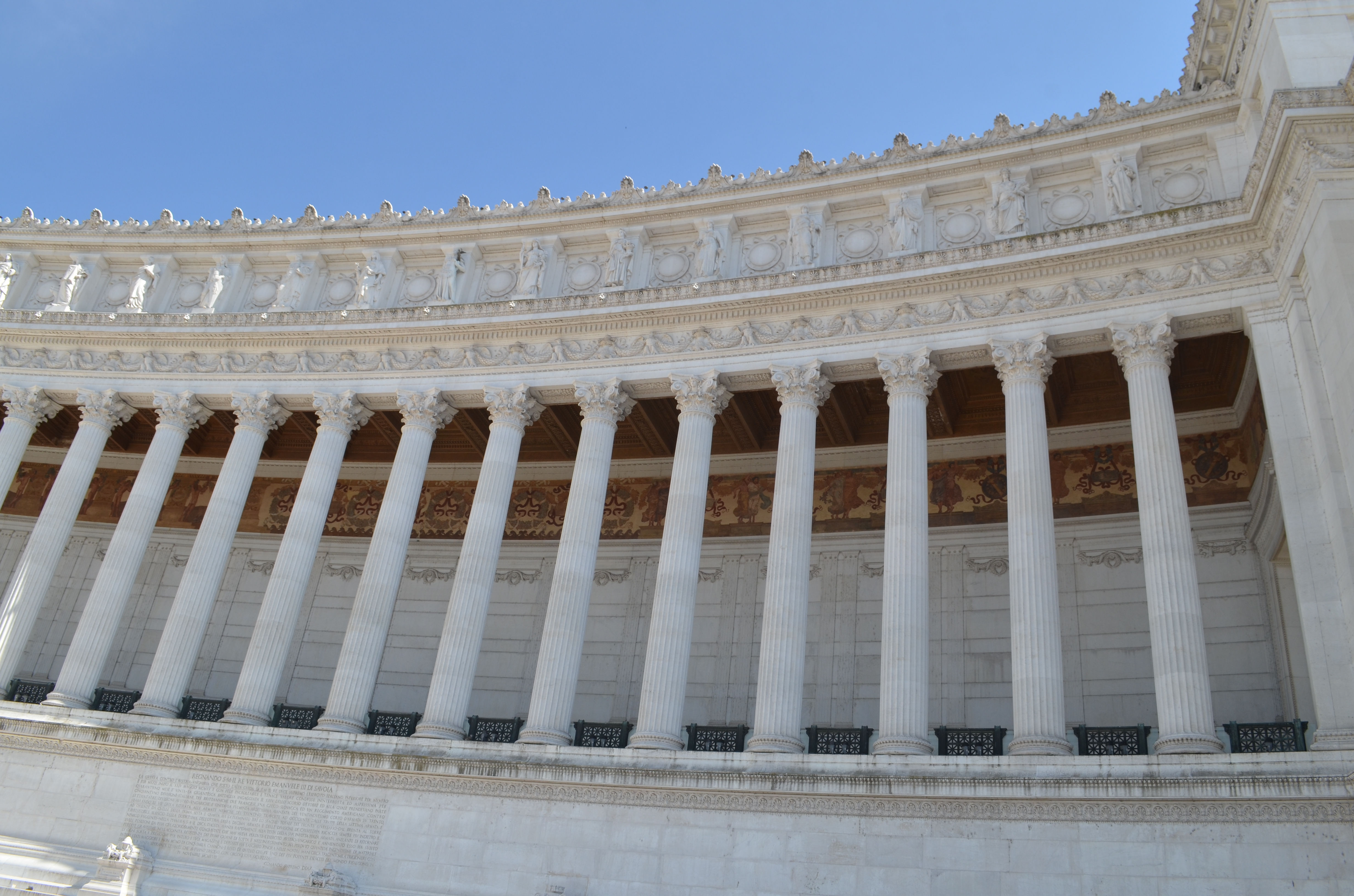 Altare della Patria